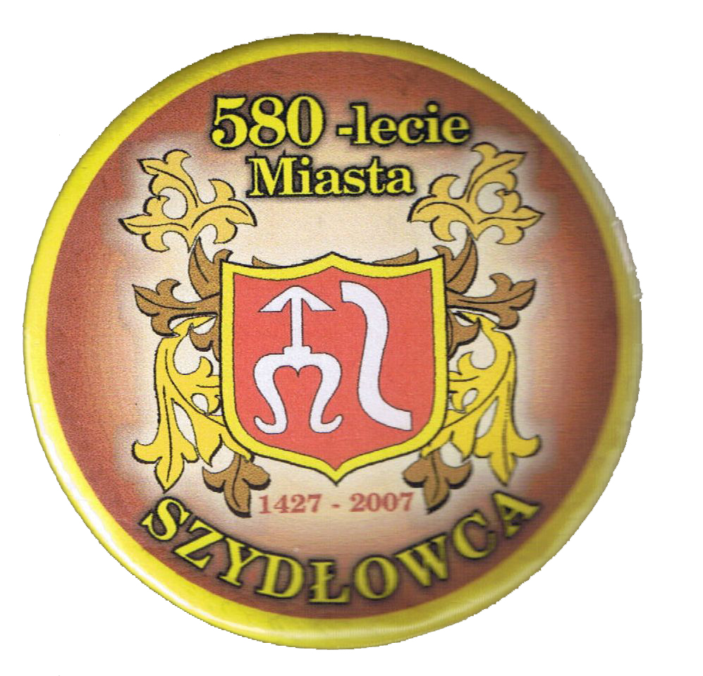 Odznaka pamiątkowa z okazji 580-lecia praw miejskich Szydłowca